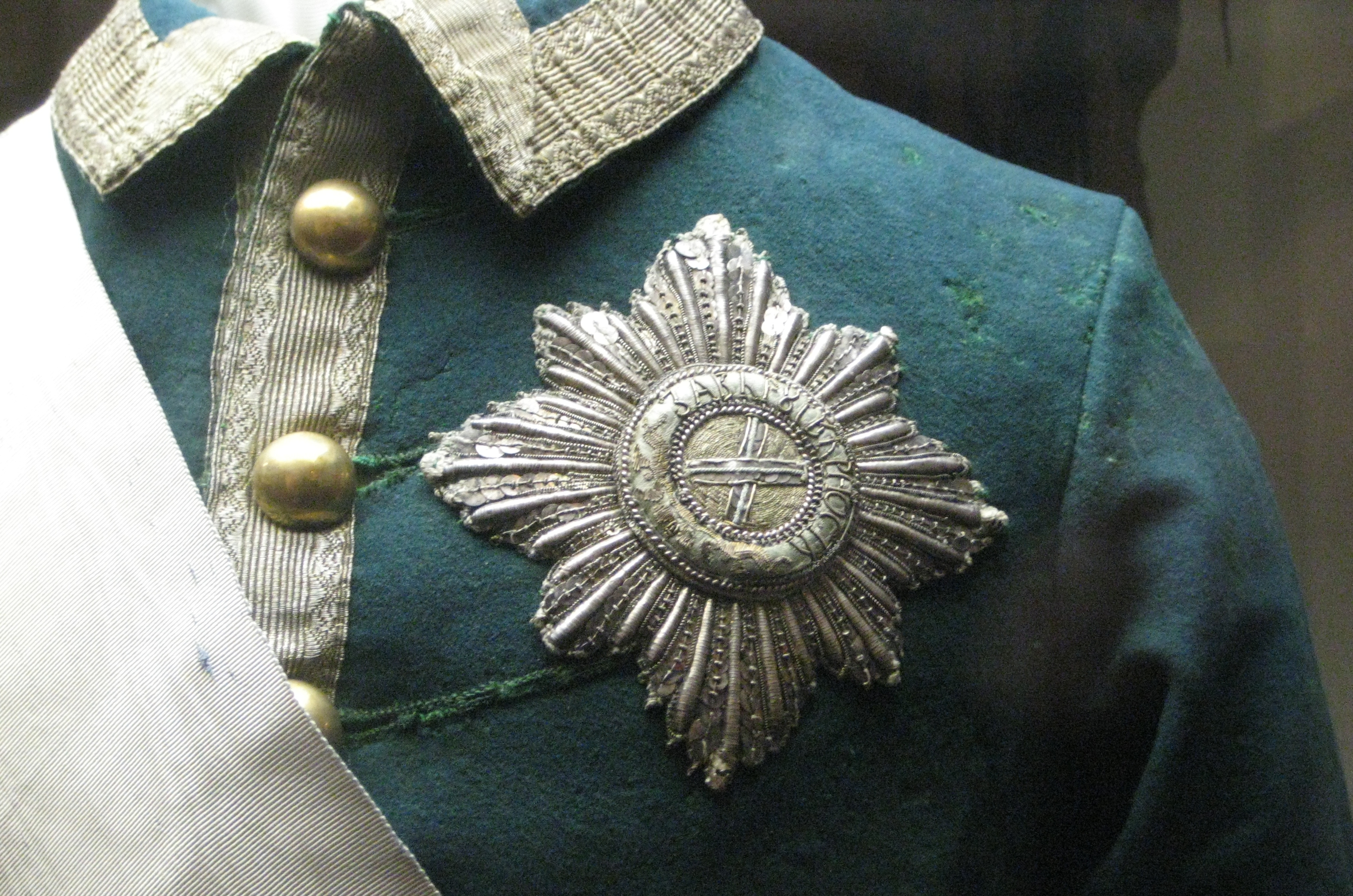 Мундир обер-офицера лейб-гвардии Семеновского полка. Россия, 1756-62. Сукно, золотный галун, шелк. Принадлежал поручику А.Ф. Талызину. В нем Екатерина II возглавила поход гвардии на Петергоф в день переворота 28 июня 1762 года.